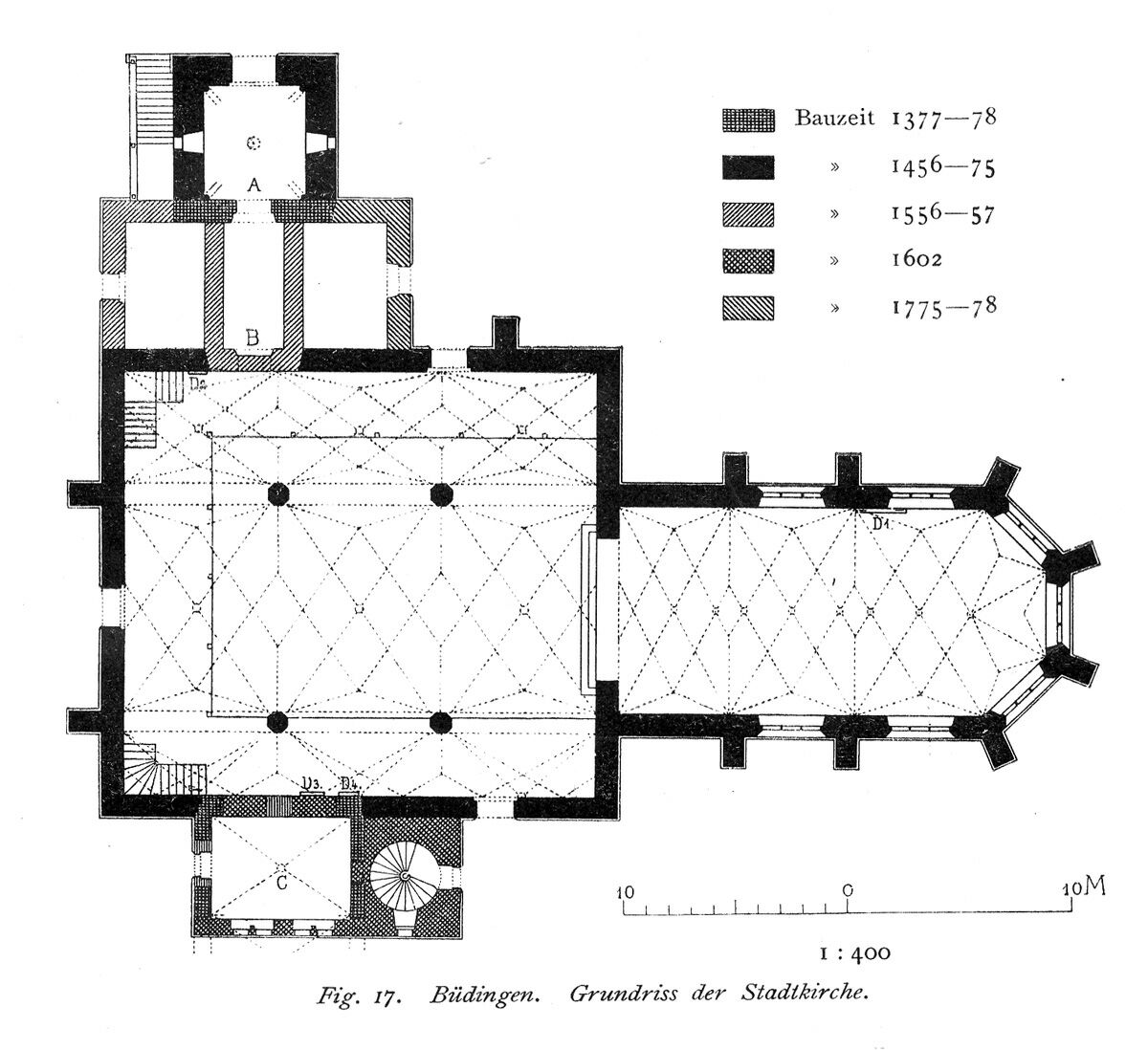 Grundrissskizze der Marienkirche in Büdingen 1890 mit Bauabschnitten